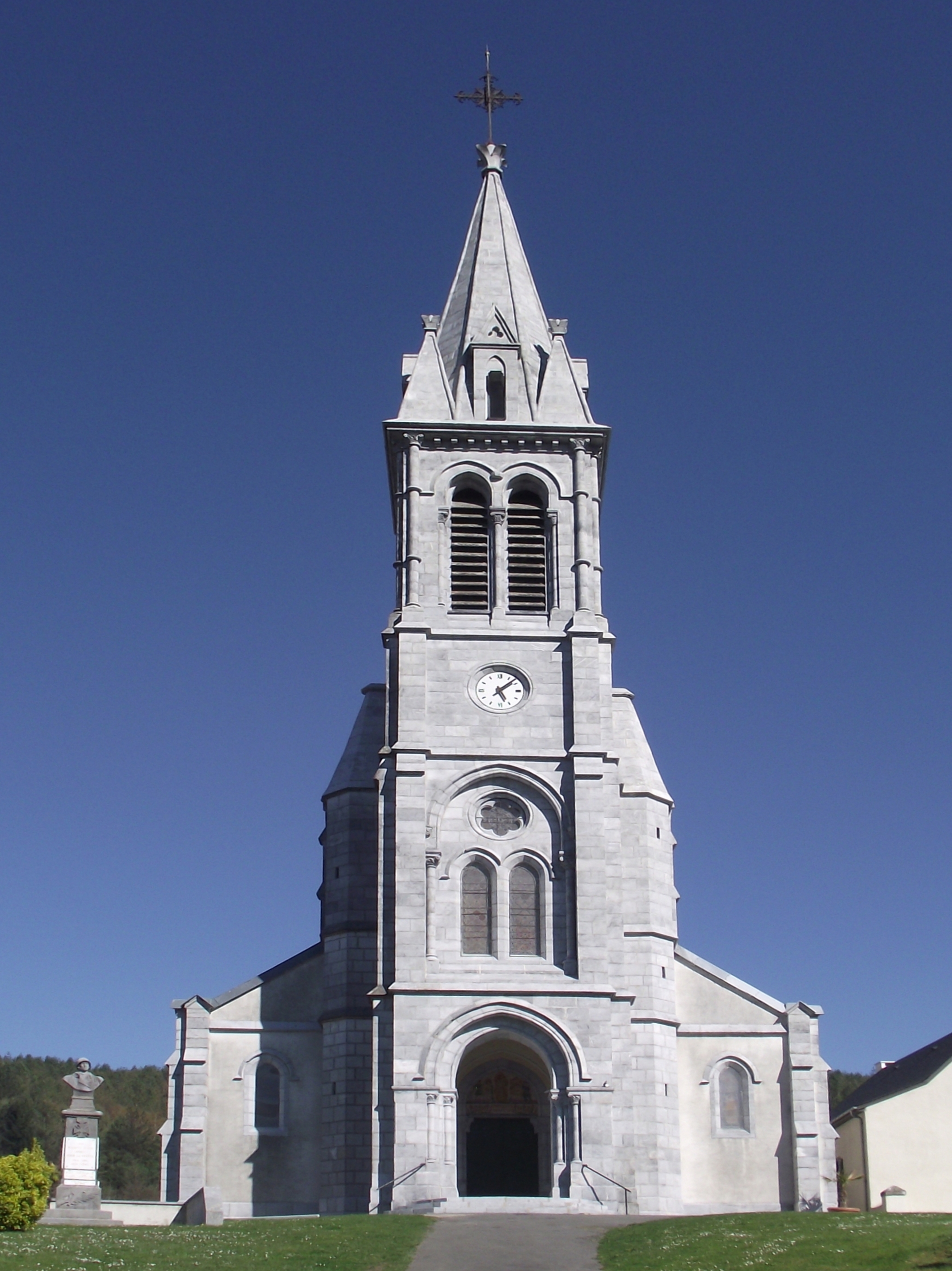 Église Saint-Hippolyte d'Adé (Hautes-Pyrénées, France)